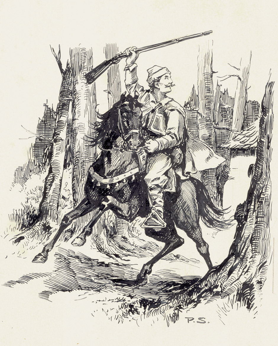 Vorlage zu einer Illustration zu Karl May: In den Schluchten des Balkan, illustrierte Ausgabe 1908, Seite 171 Kara Ben Nemsi auf Rih. Federzeichnung No 9 in schwarzer Tusche, auf Karton. Monogrammiert: "P.S.". Bildgröße: 12,5 x 11,6 cm. Kartongröße: 24,8 x 22,2 cm